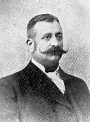 Andrei Bârseanu (n. 1858, Dârste, Brașov - d. 17 august 1922, București) a fost un folclorist român, director al ASTREI între anii 1911-1922. Împreună cu Jan Urban Jarník, filolog romanist ceh, pasionat de folclorul românesc, a fost autor al culegerilor Cincizeci de colinde și Doine și strigături din Ardeal.